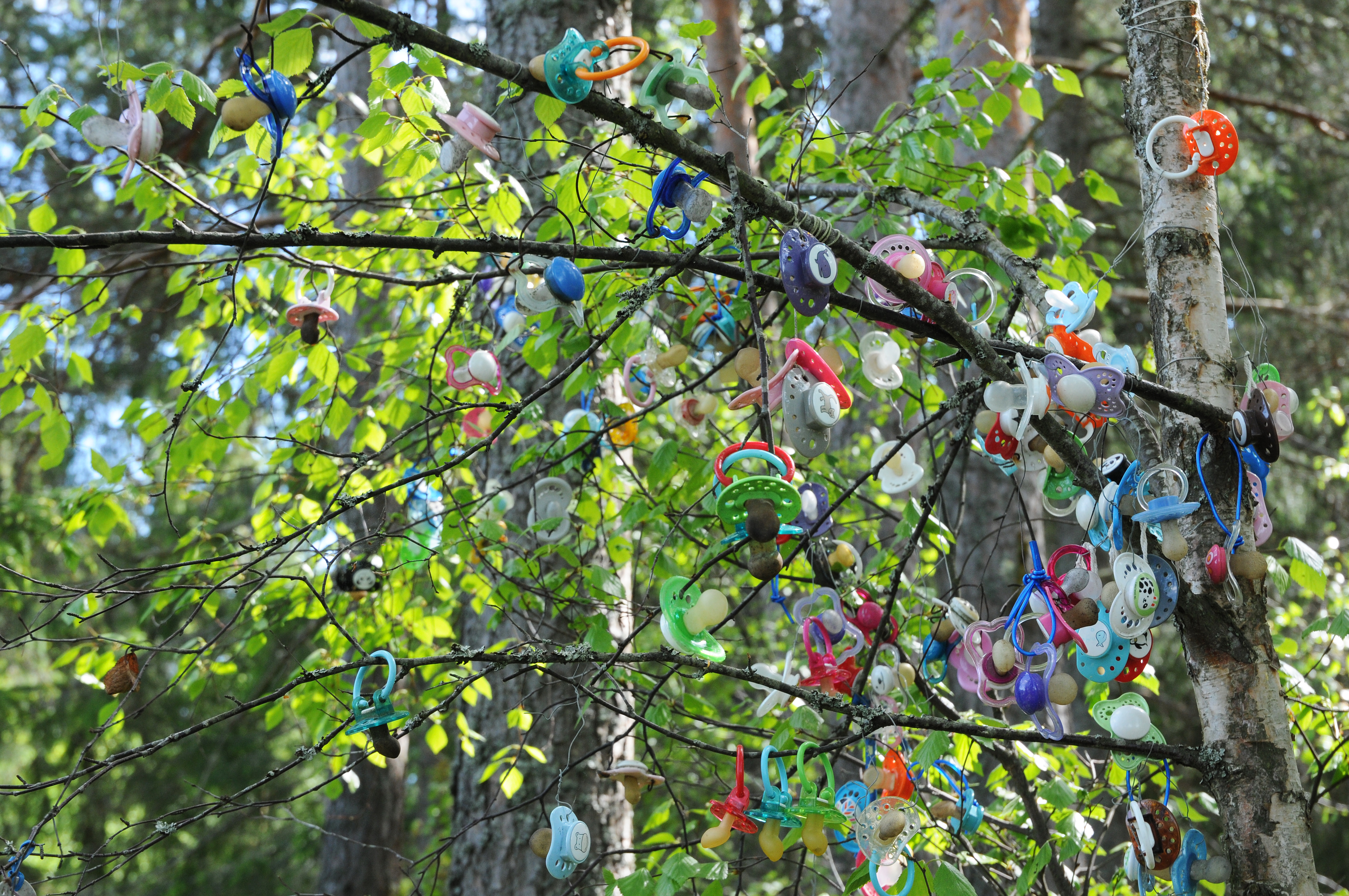 Nappträdet i Janstorpsskogen på Arnö i Nyköping